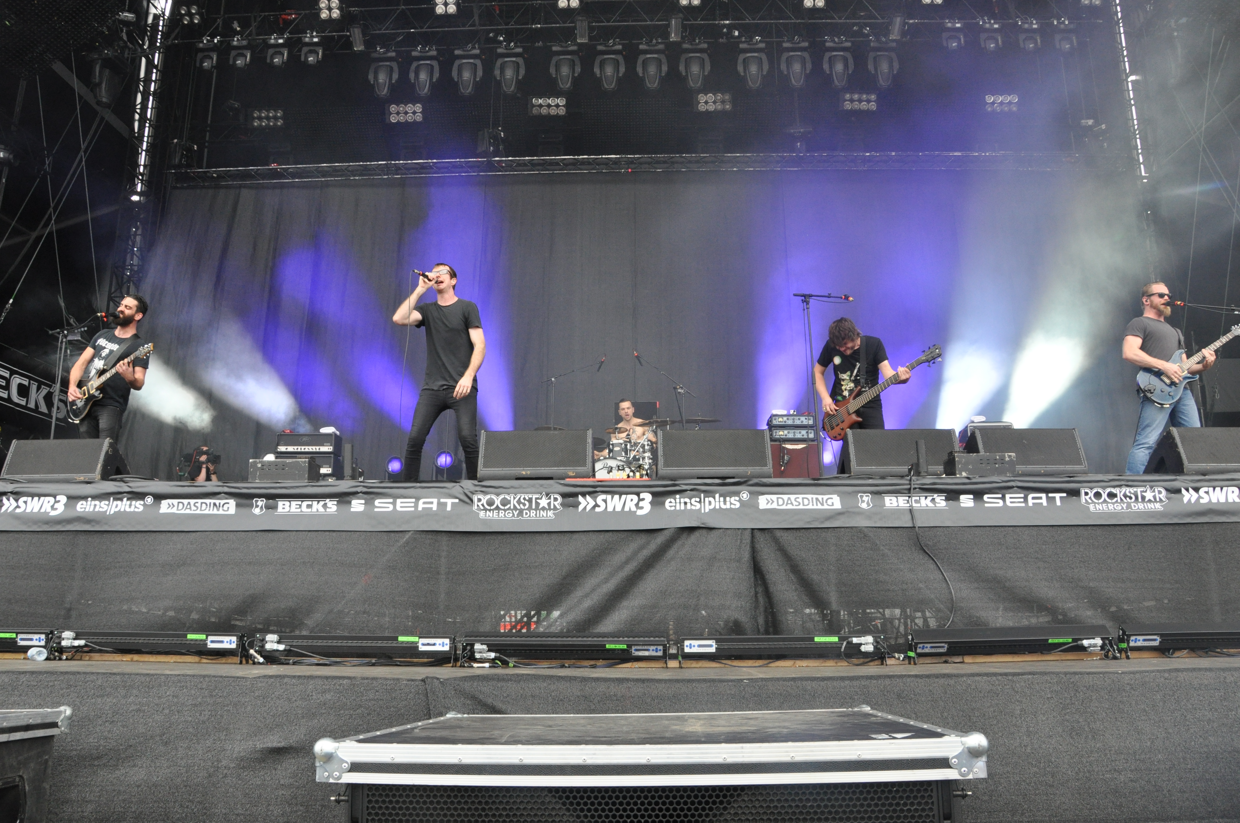 Karnivool spielen auf der Alternastage bei Rock am Ring 2014